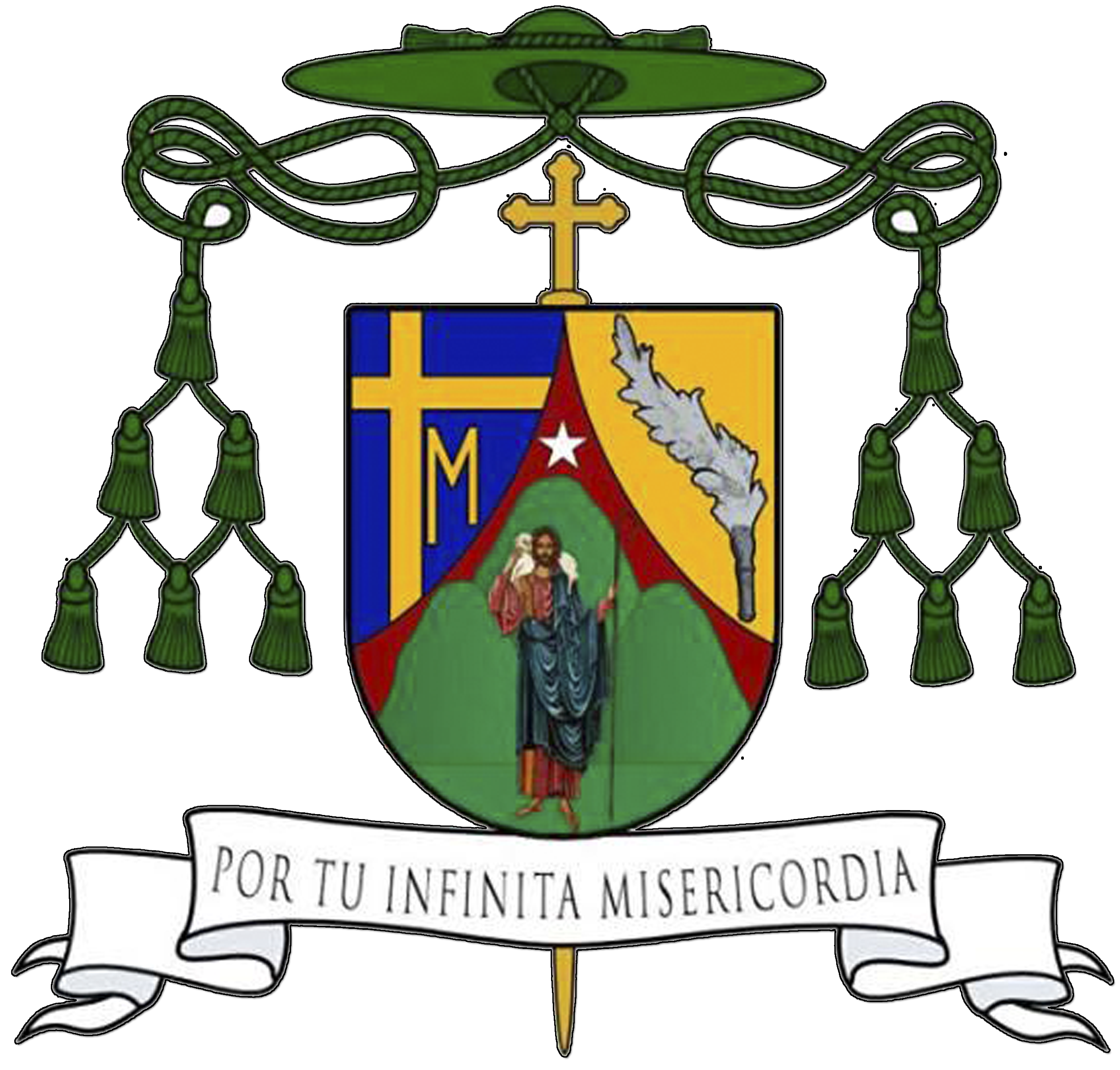 Escudo del II Obispo de Punto Fijo Monseñor Carlos Cabezas